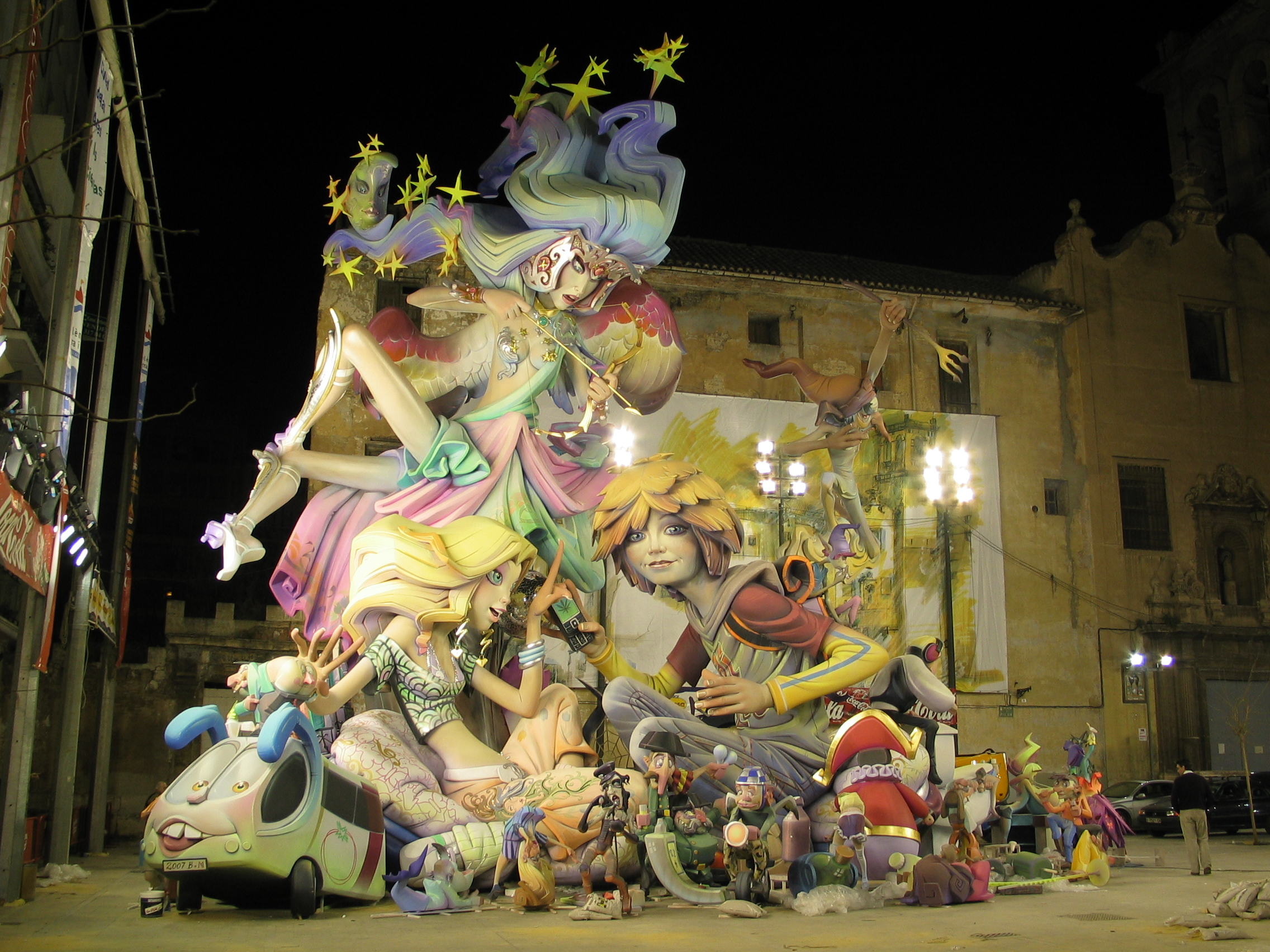 Valencia: Fallas '07